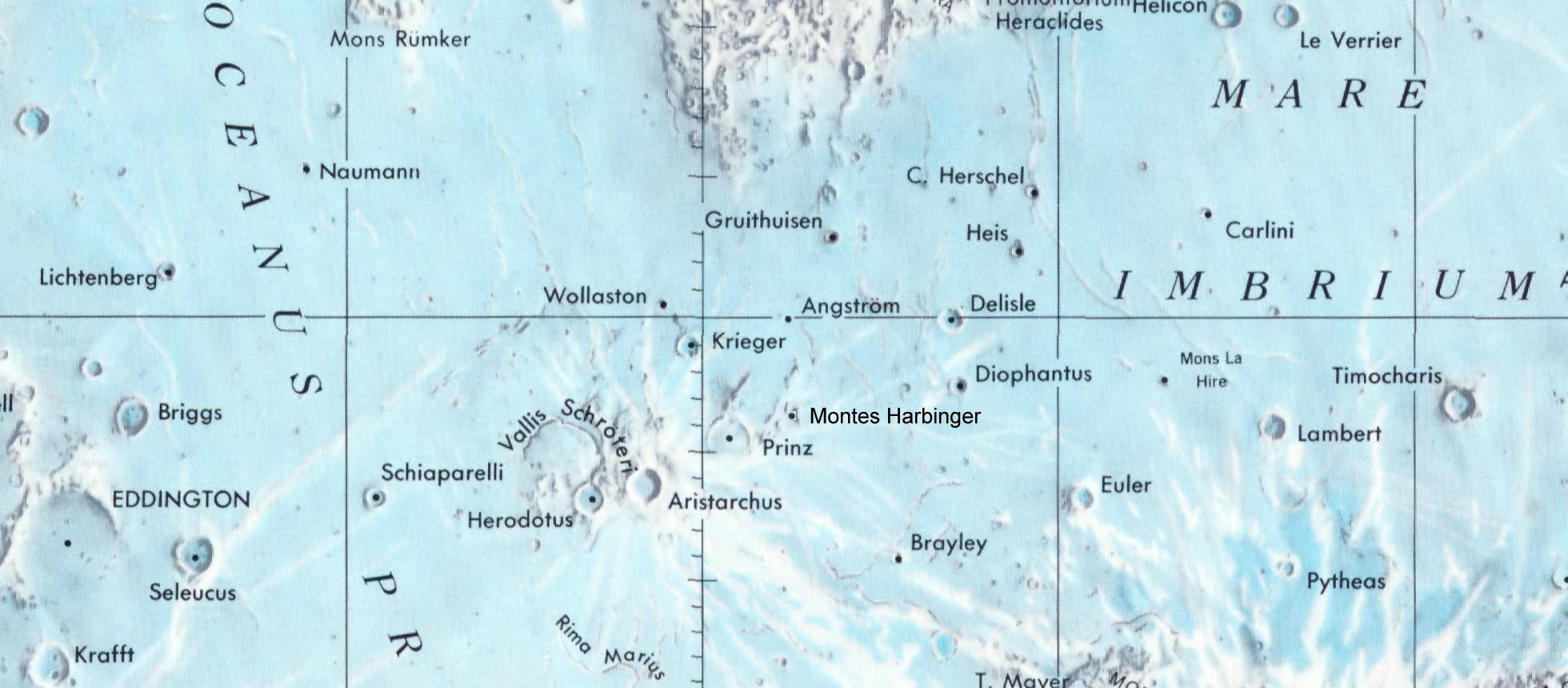 Montes Harbinger en la Luna . Localización. (Lunar Chart LPC1. Second Edition)